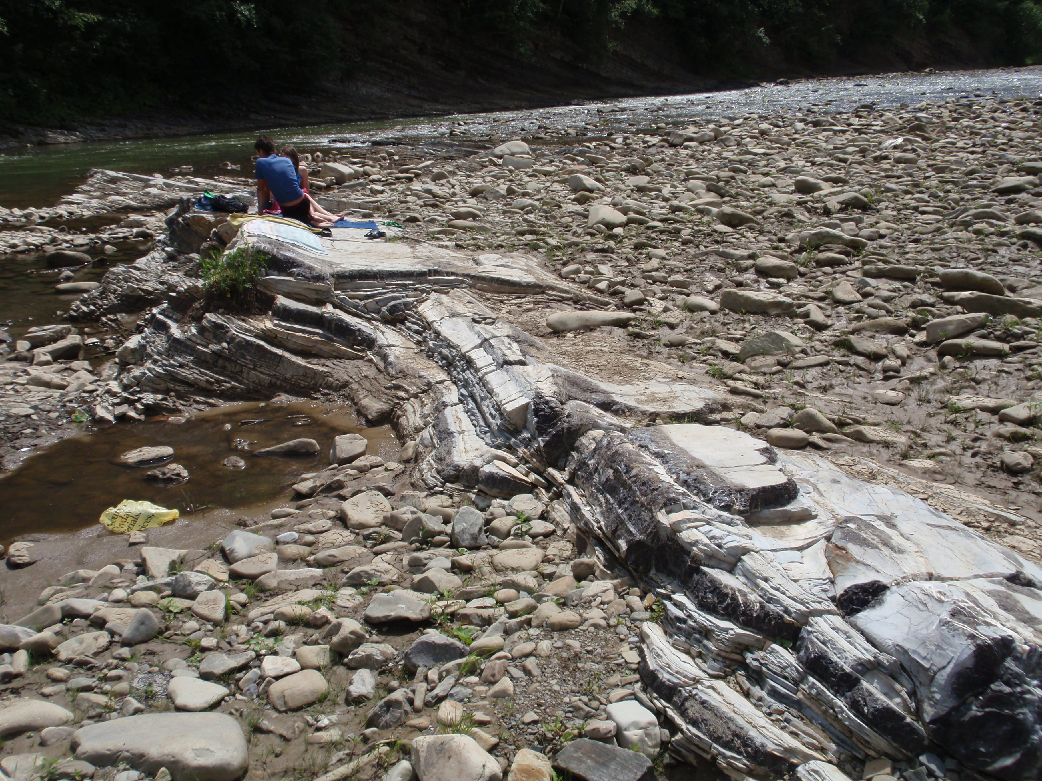 Русло річки Опір, Сколе